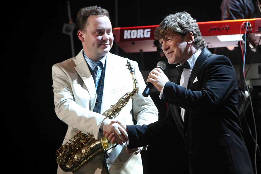 Алекс Новиков на выступлени